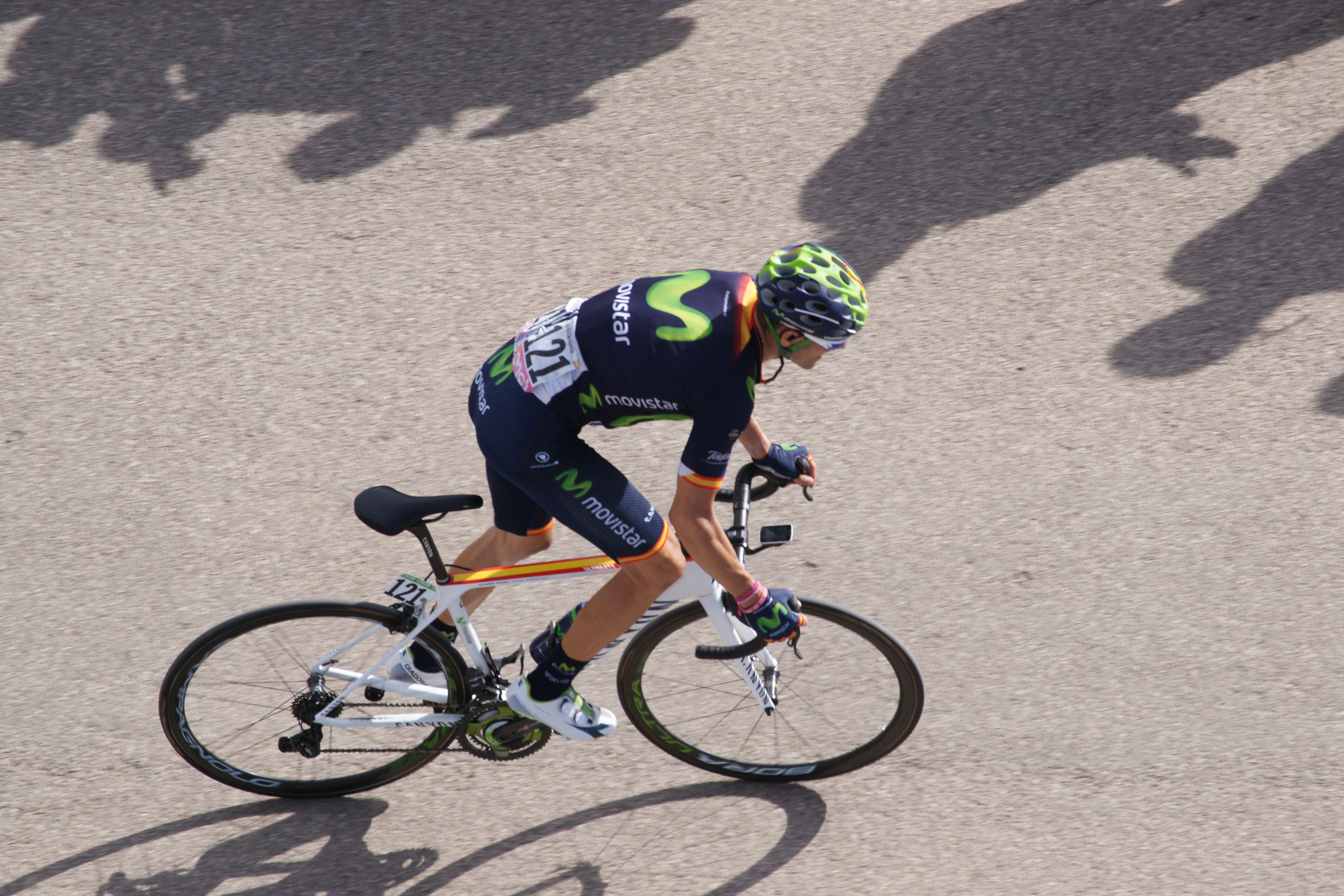 Alejandro Valverde, étape 20 col de la Lombarde Giro 2016